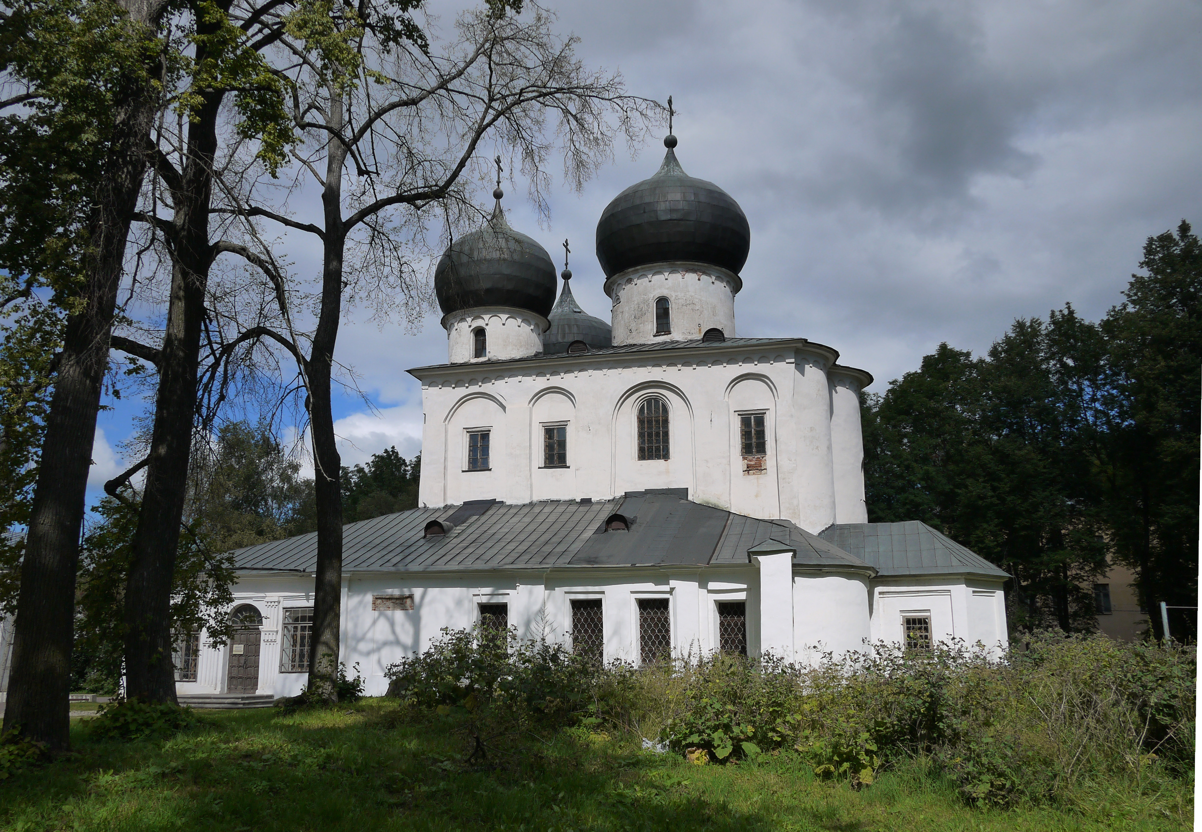 Собор Рождества Пресвятой Богородицы (Новгородская область, Великий Новгород, Антоново)